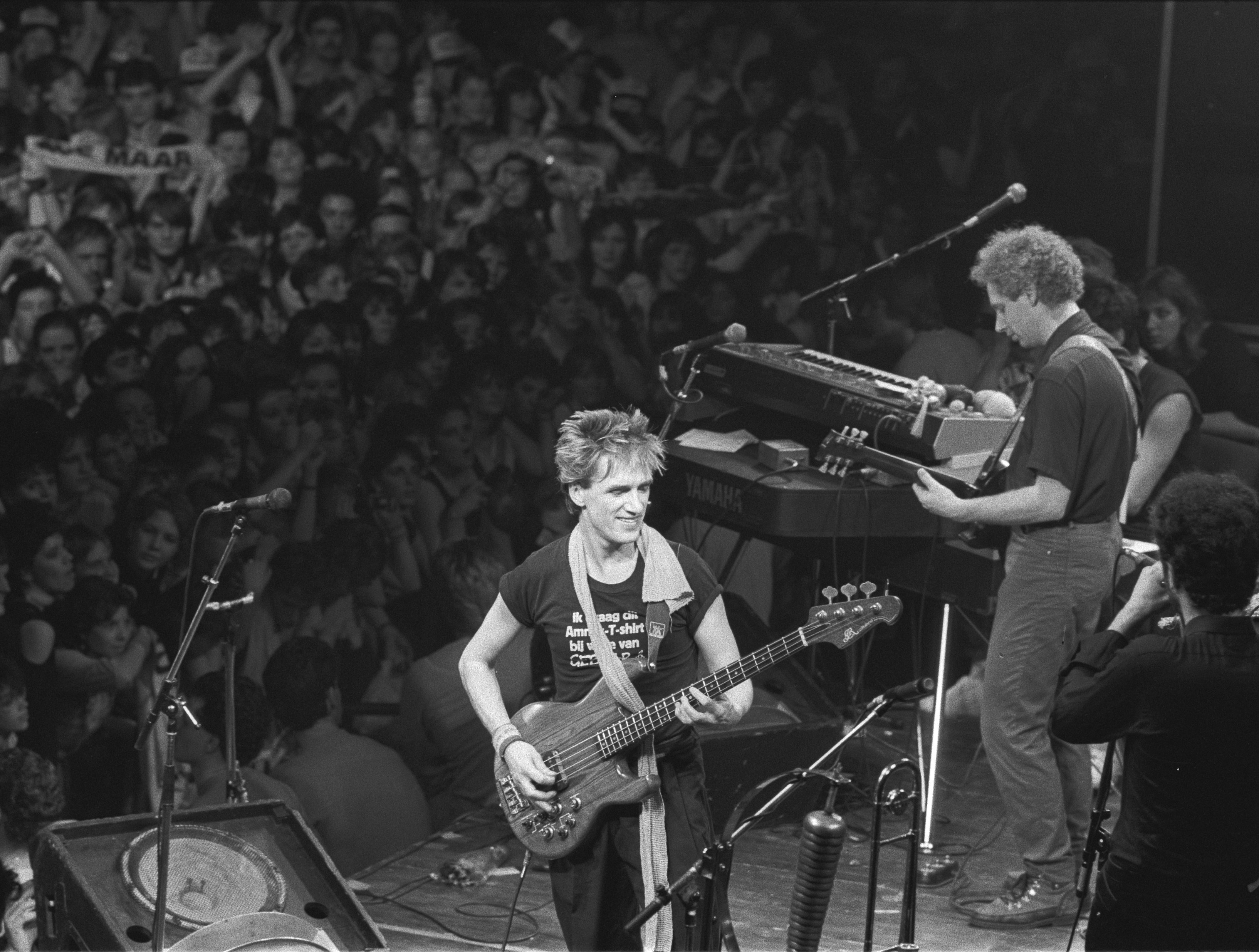 Collectie / Archief : Fotocollectie Anefo Reportage / Serie : [ onbekend ] Beschrijving : Afscheidsconcert van "Doe Maar" in Den Bosch ; overzicht met links Henny Vrienten Datum : 14 april 1984 Locatie : Den Bosch Trefwoorden : afscheid, concerten, muziek, popgroepen Persoonsnaam : Vrienten Henny Fotograaf : Bogaerts, Rob / Anefo Auteursrechthebbende : Nationaal Archief Materiaalsoort : Negatief (zwart/wit) Nummer archiefinventaris : bekijk toegang 2.24.01.05 Bestanddeelnummer : 932-9336